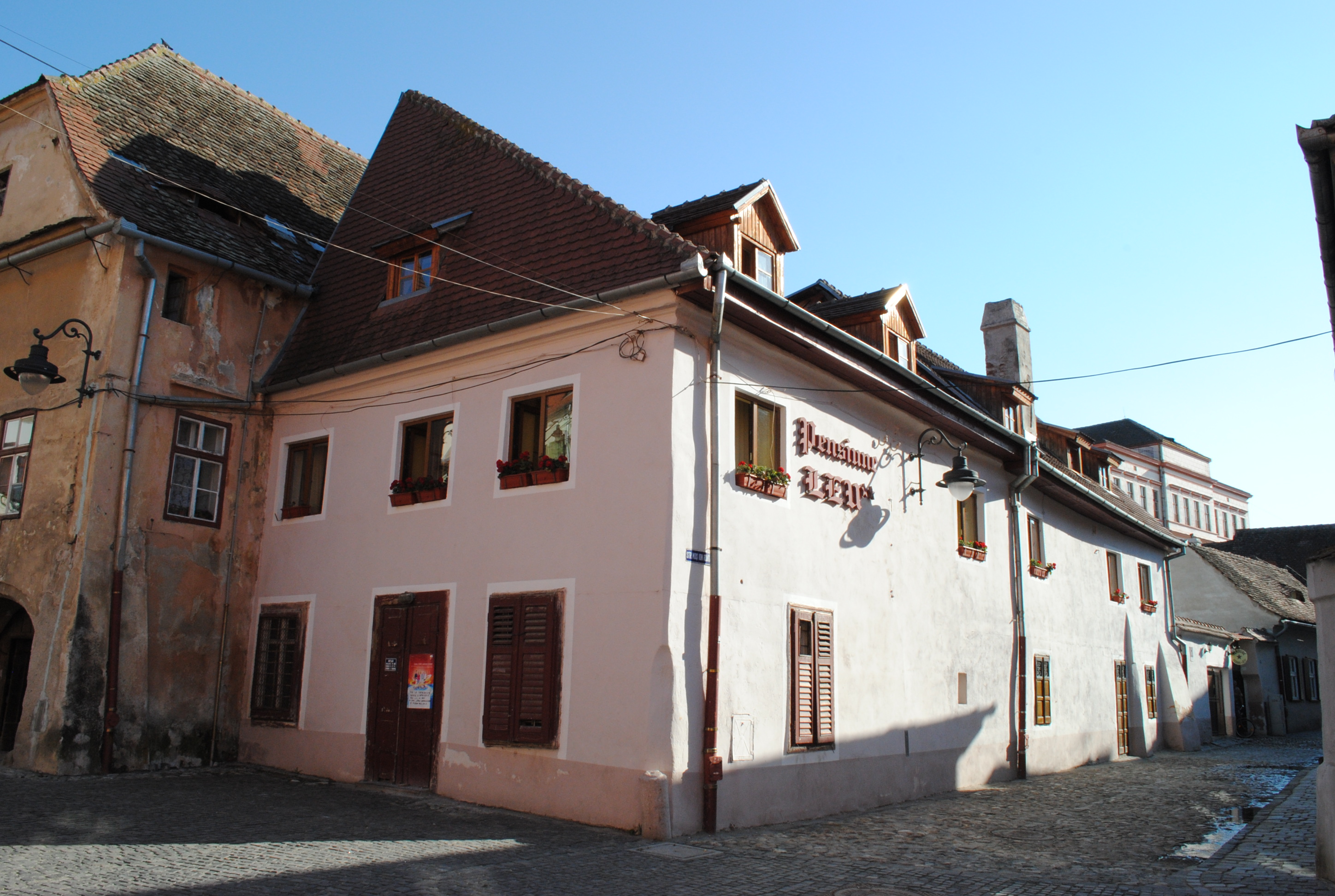 Casă, sec. XV - XVIII